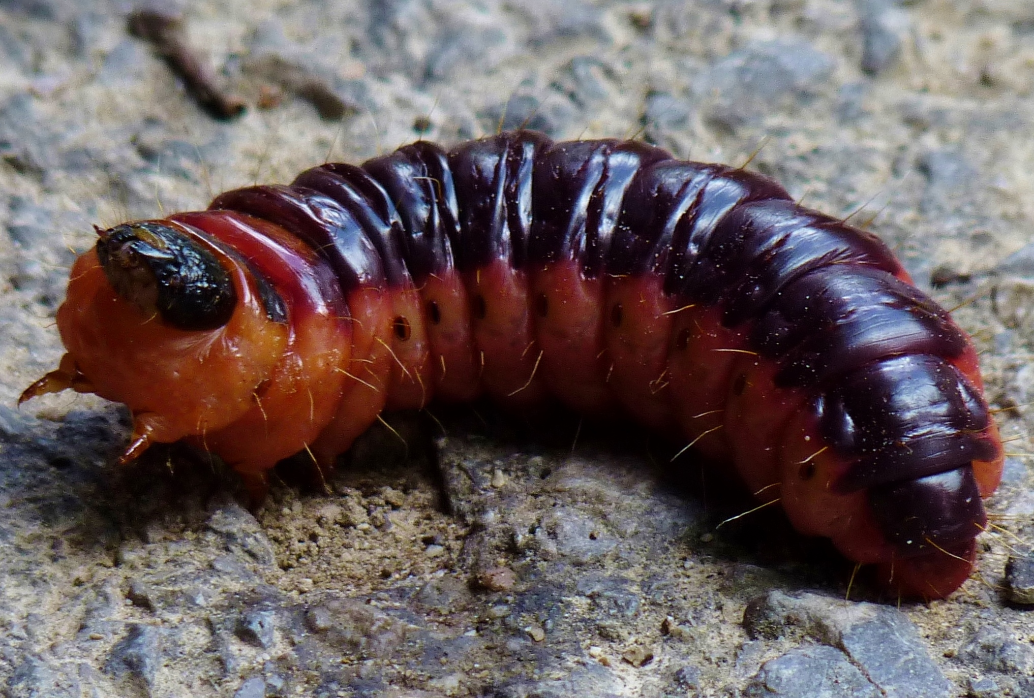 Raupe